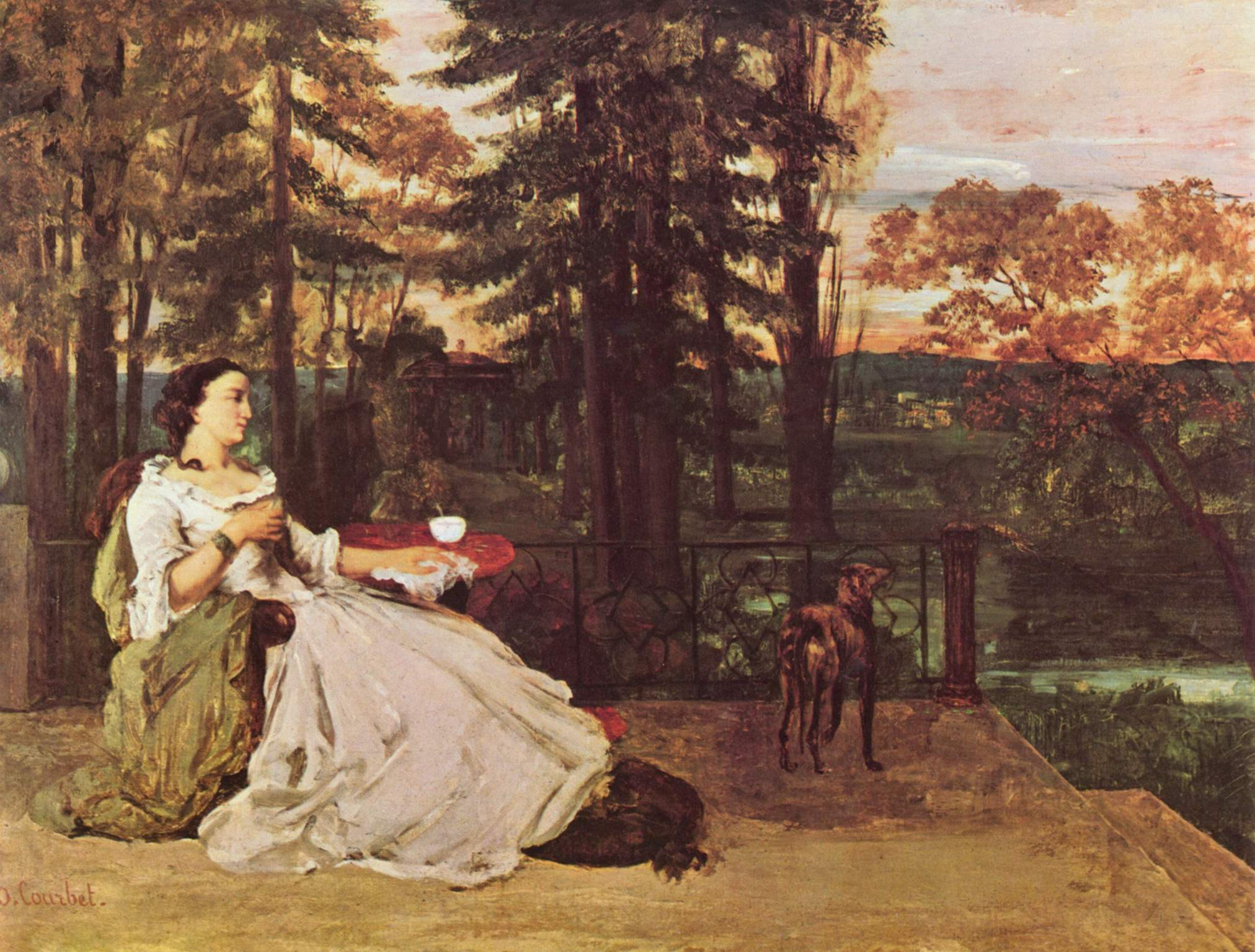 Gustave Courbet hat die „Dame auf der Terrasse“ während seines Aufenthalts in Frankfurt am Main im Herbst 1858 gemalt. Nicht abschließend zu klären ist, wer hier gemalt wurde. Angeblich wurde hier von Gustave Courbet die Braut Caroline von Bernus (1859) kurz vor ihrer Hochzeit mit Wilhelm von Erlanger gemalt.